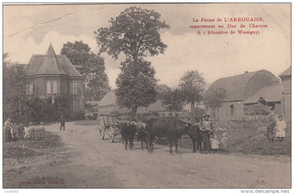 Vue de la tour Est depuis l'ancienne route de l'Arrouaise.